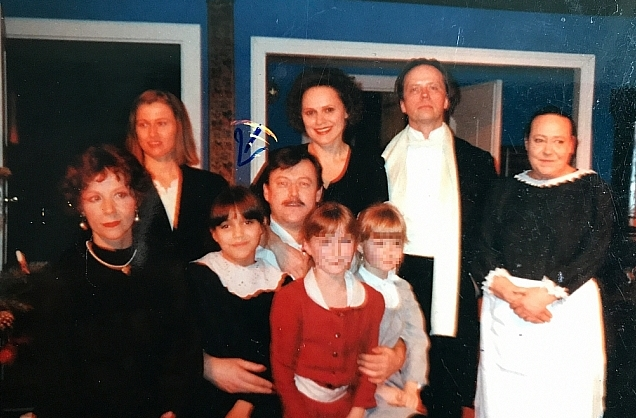 Daniela Molina mit Michael Kausch & Andrea Nürnberger im Stück "Nora oder ein Puppenheim" Regie: Heribert Sasse (Schlosspark Theater, Berlin 1996)